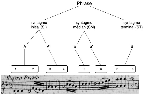 Détail d'une structure d'une phrase musicale classique (XVIIIe siècle - XXe siècle). Le niveau le plus haut est la phrase dans sa globalité. Viennent ensuite ses trois parties: SI; SM et ST. Puis ses sous-parties caractérisées par des lettres: A, A'; a, a' et B. Et enfin les numéros des mesures correspondantes. La phrase qui sert d'exemple est tirée de la partie de violon 1 du début de la Symphonie n°2 de Joseph Boulogne de Saint-George ( Le diagramme est inspiré par le livre « Traité de sujets musicaux » de Yizhak Sadaï (éd. L'Harmattan, 2003)